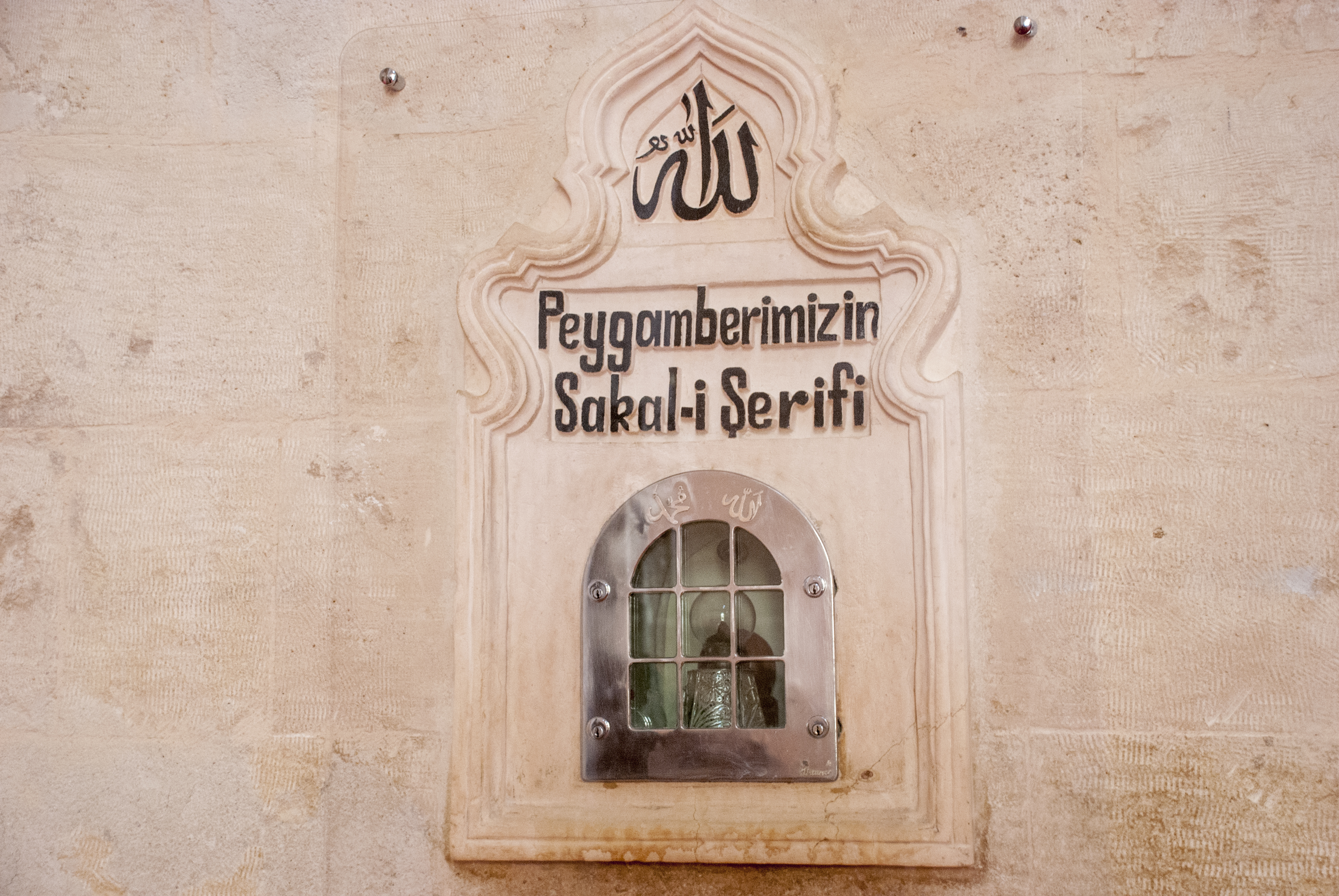 Mardin ulu cami sakalı şerifi